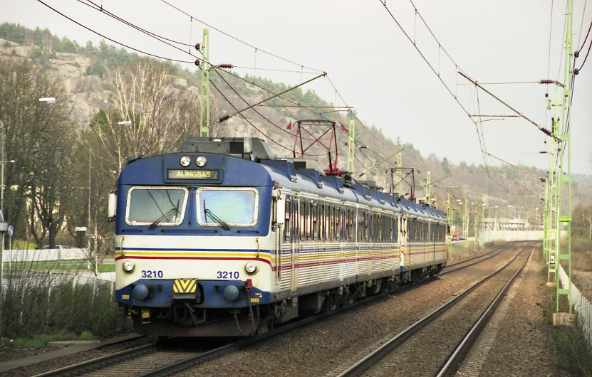 X11 pendeltåg 3210+3142 på stambanan vid Partille station